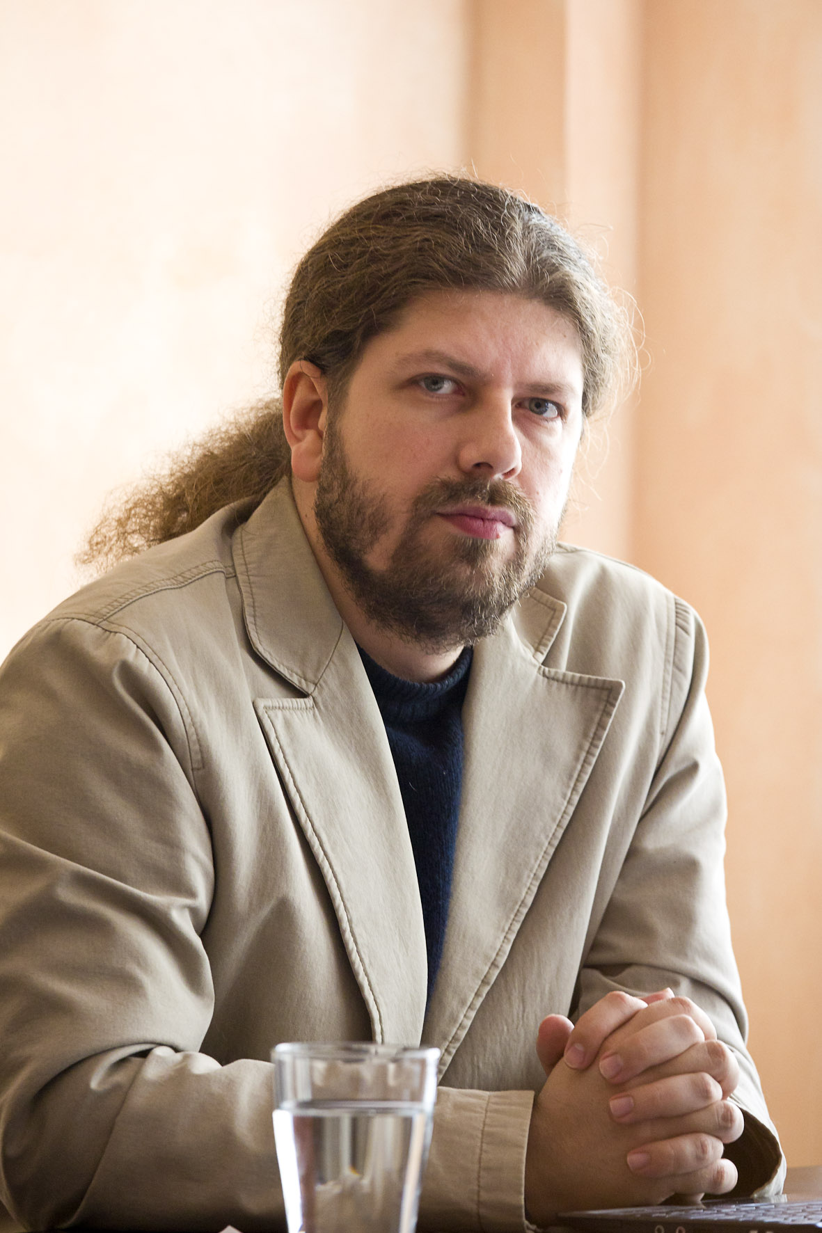 Remus Cernea, la o conferință de presă în 27 februarie 2011